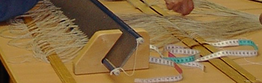 Förskedning.